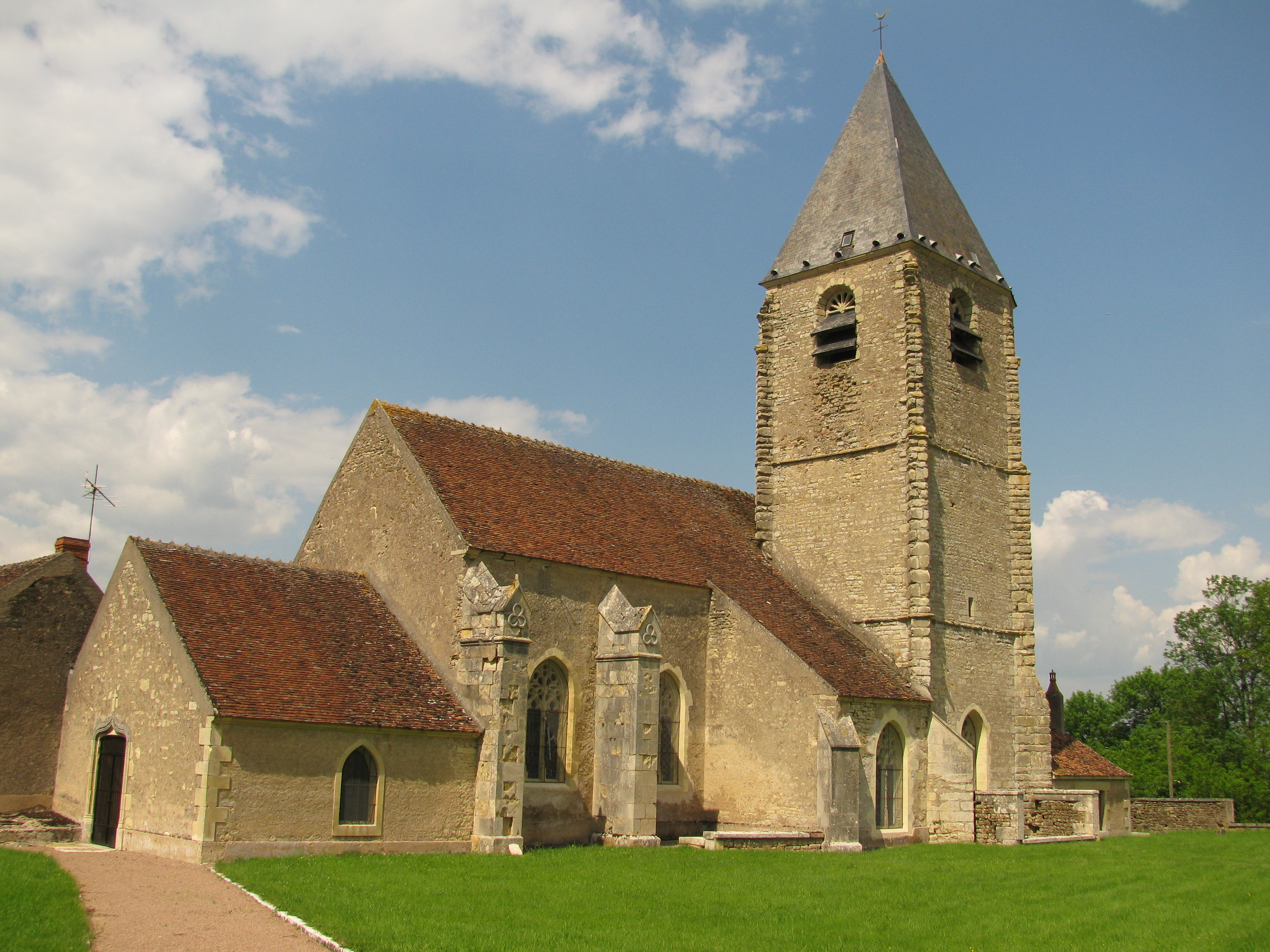 Église Saint-Martin, à Lys, Nièvre, France.